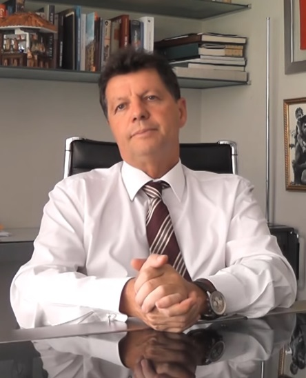 Alfonso Rojo. Mayo de 2012